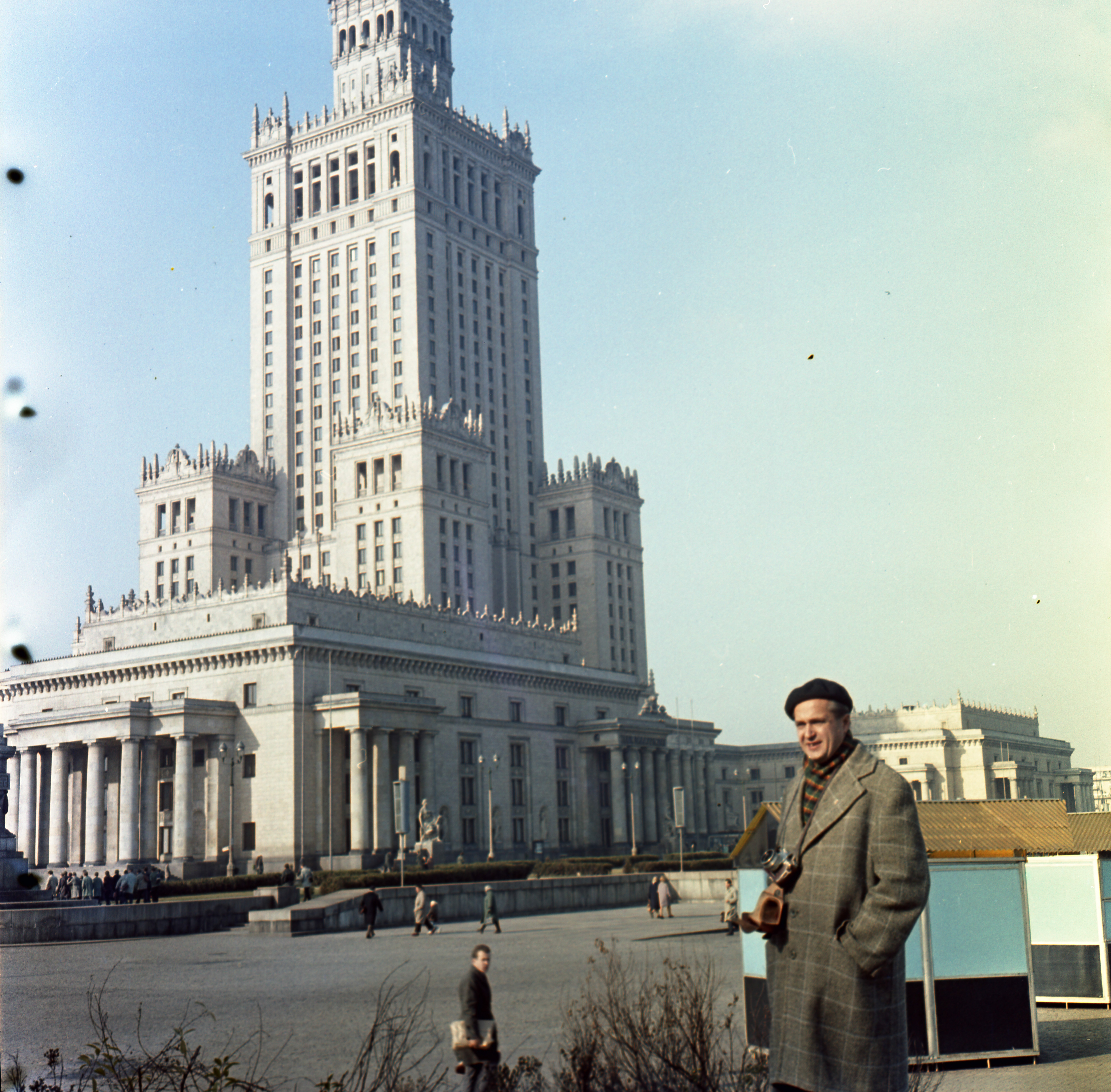 a Kultúra és Tudomány Palotája. Location: Poland, Warsaw Tags: colorful Title: a Kultúra és Tudomány Palotája.